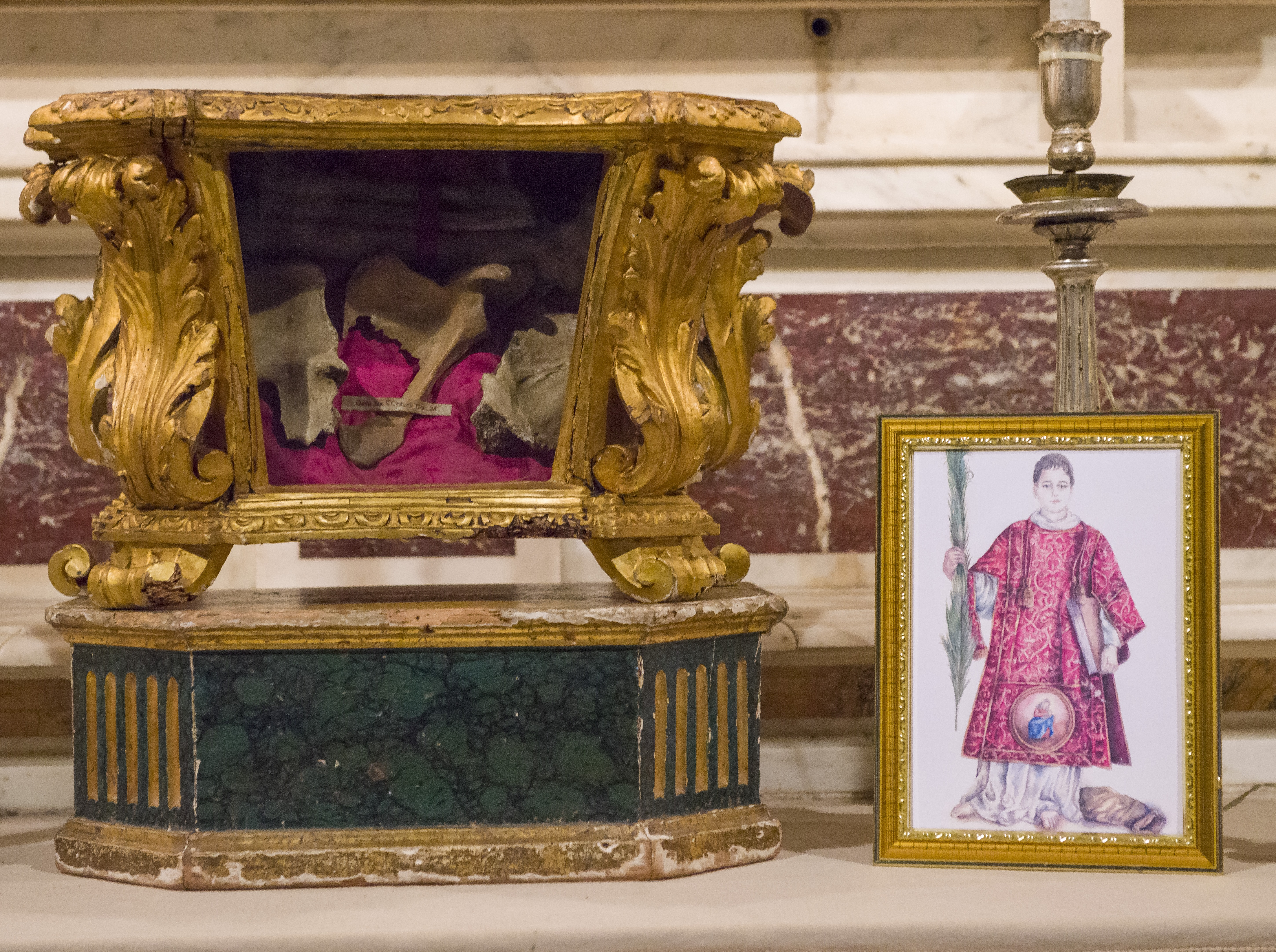 Lucca, Basilica di San Frediano: Mons. Michelangelo Giannotti, Vicario Generale della Diocesi, ha esposto la nuova icona di San Cesario accanto al reliquiario contenente sei ossa del diacono, donate dal papa Alessandro II (foto Lucio Ghilardi)